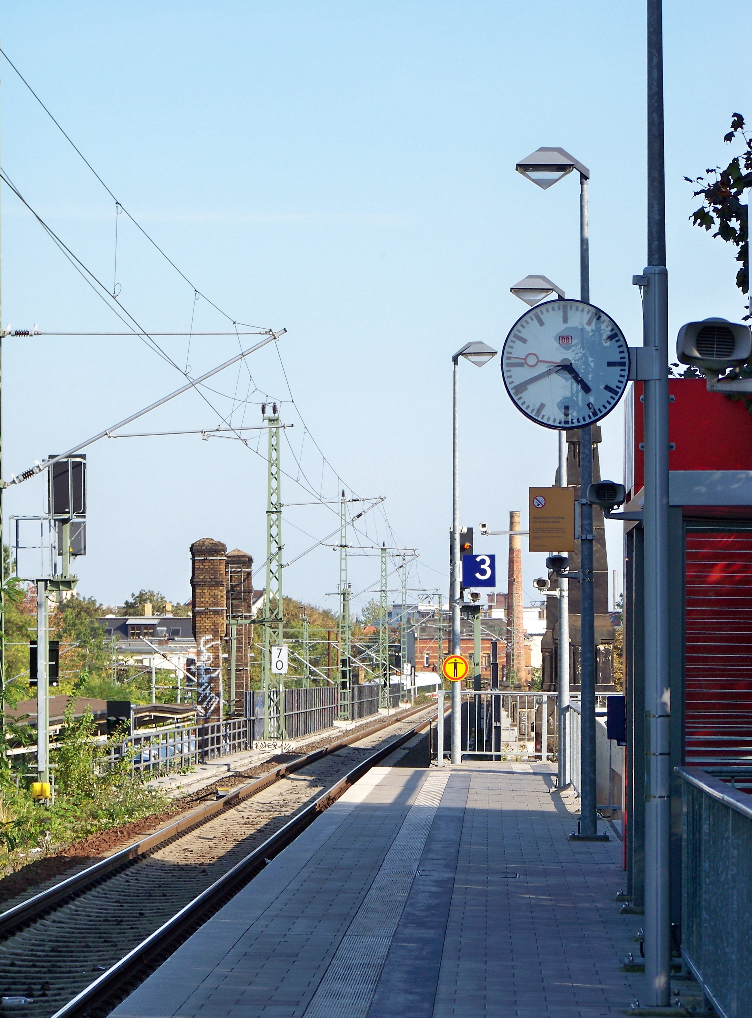 Hochbahnsteig 3 der S-Bahnlinie 10 des Bahnhofs Leipzig Gohlis